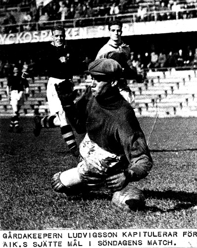 Rune Ludvigsson Gårda BK i en allsvensk match mot AIK på Råsunda den 26 april 1943. Resultat AIK - Gårda BK 7-1.